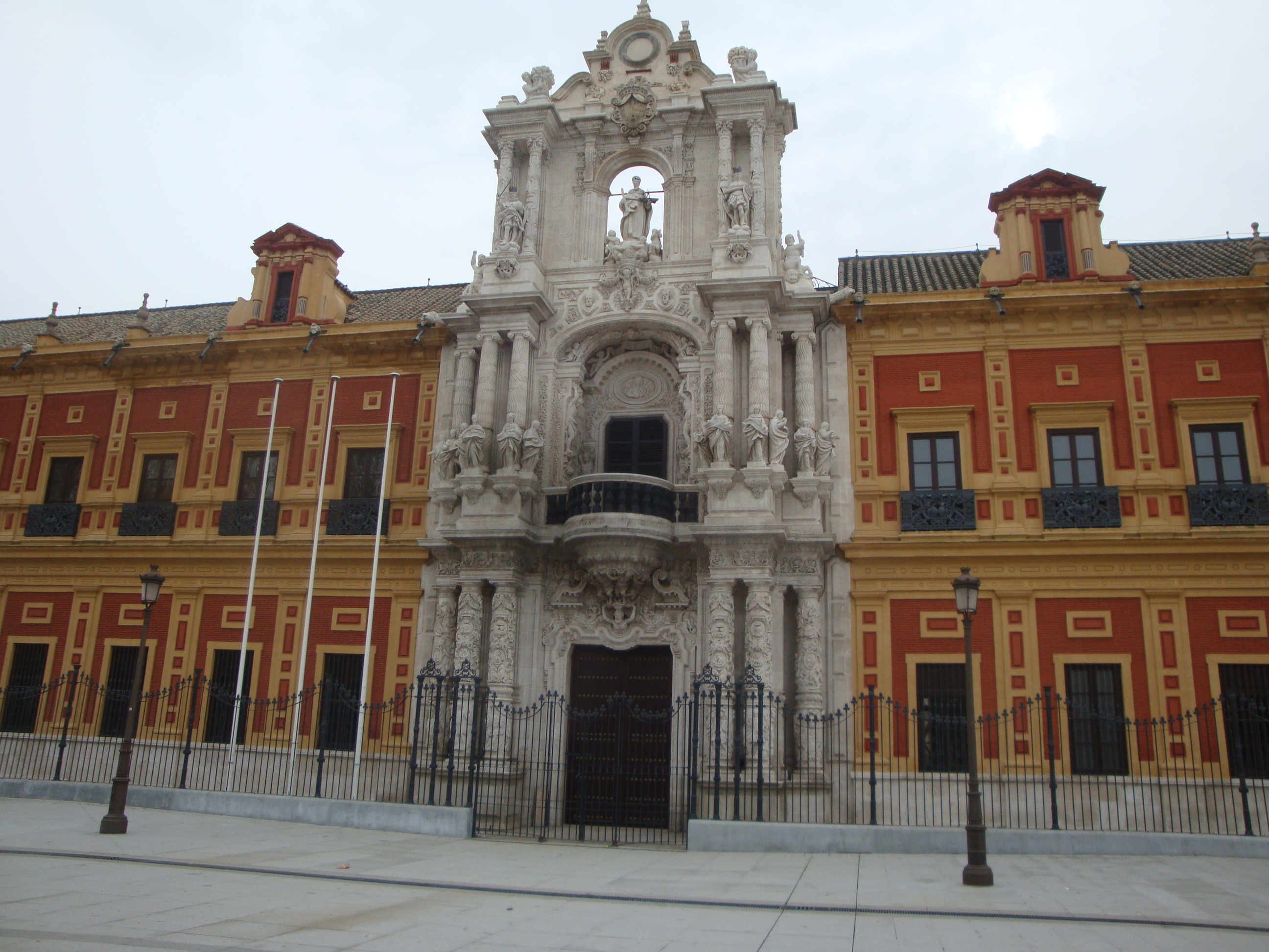 Fachada principal del palacio de San Telmo. Sevilla